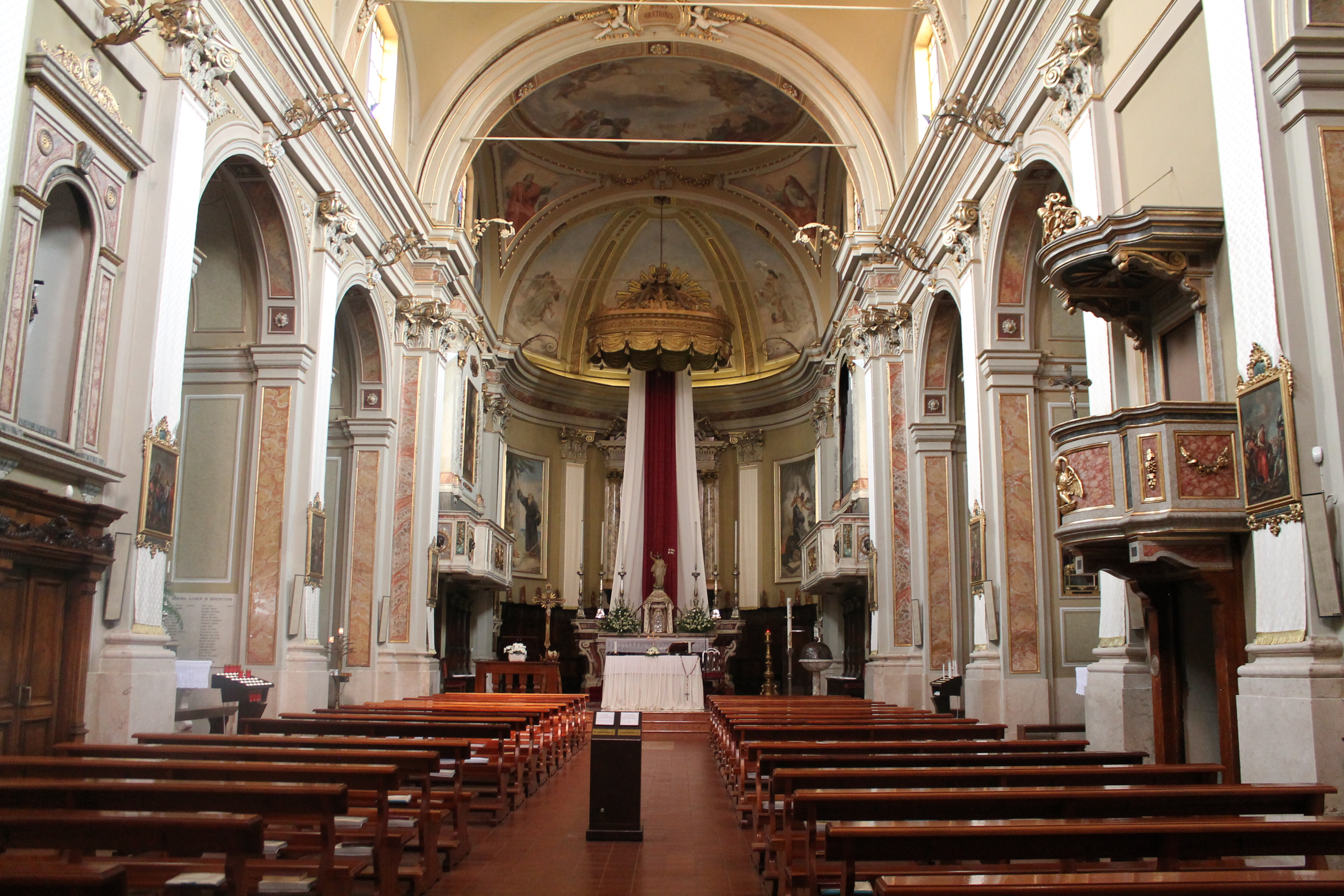 Veduta dell'interno della Chiesa Parrocchiale di Castelcovati.